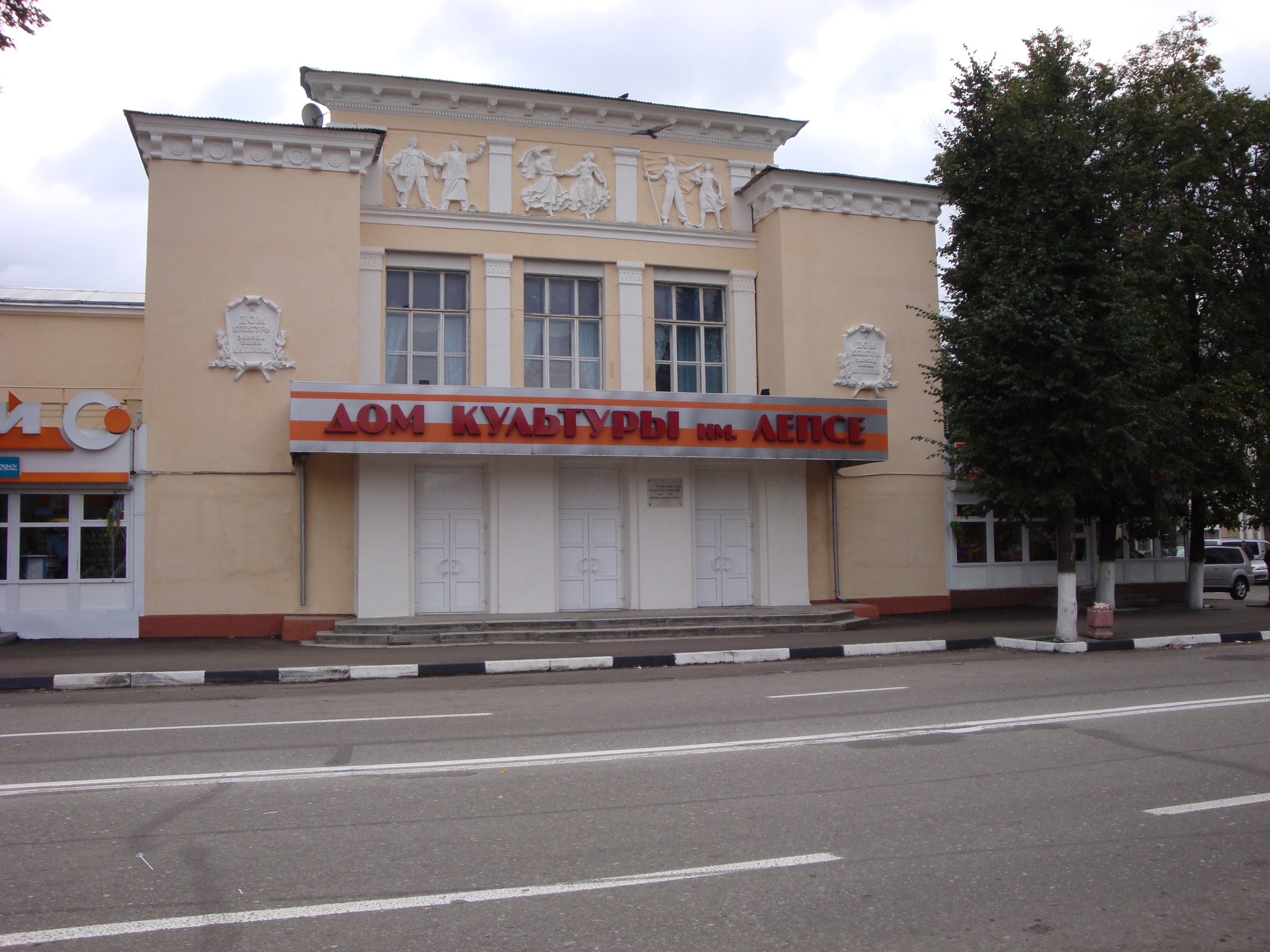 ДК им. Лепсе (изначально Клуб завода имени Калинина) в Подольске